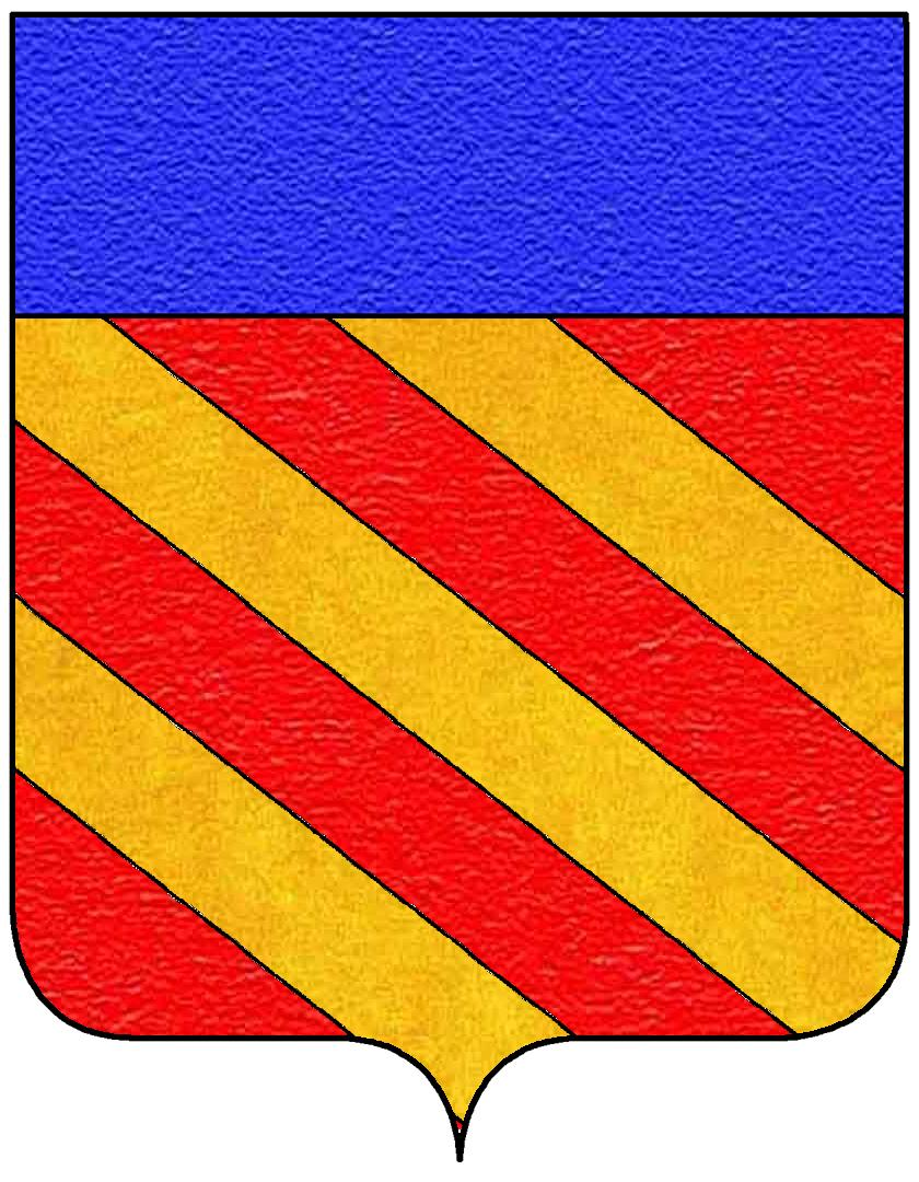 Stemma della famiglia Caracciolo